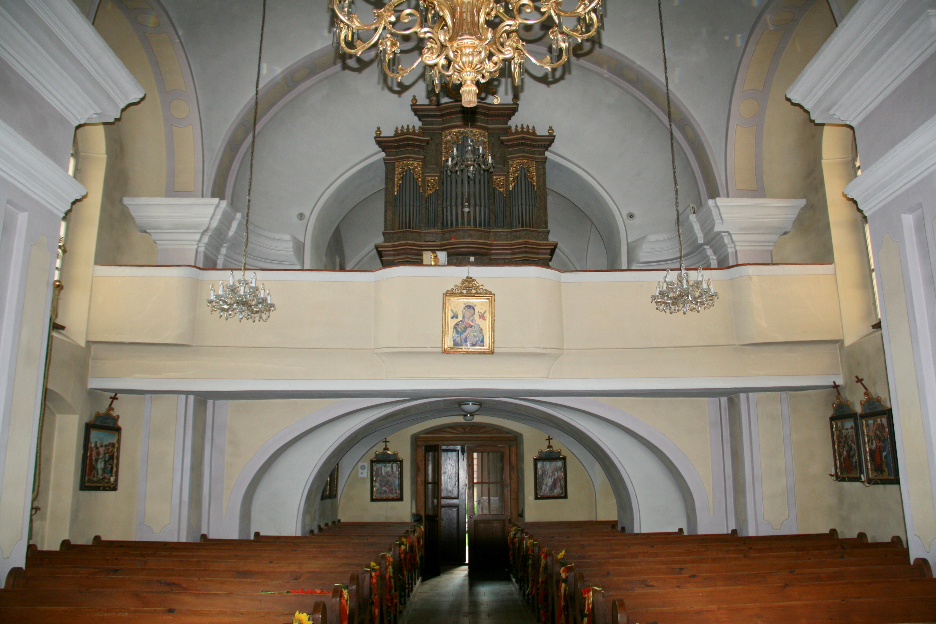 Kath. Pfarrkirche hll. Peter und Paul und Kirchhofmauer